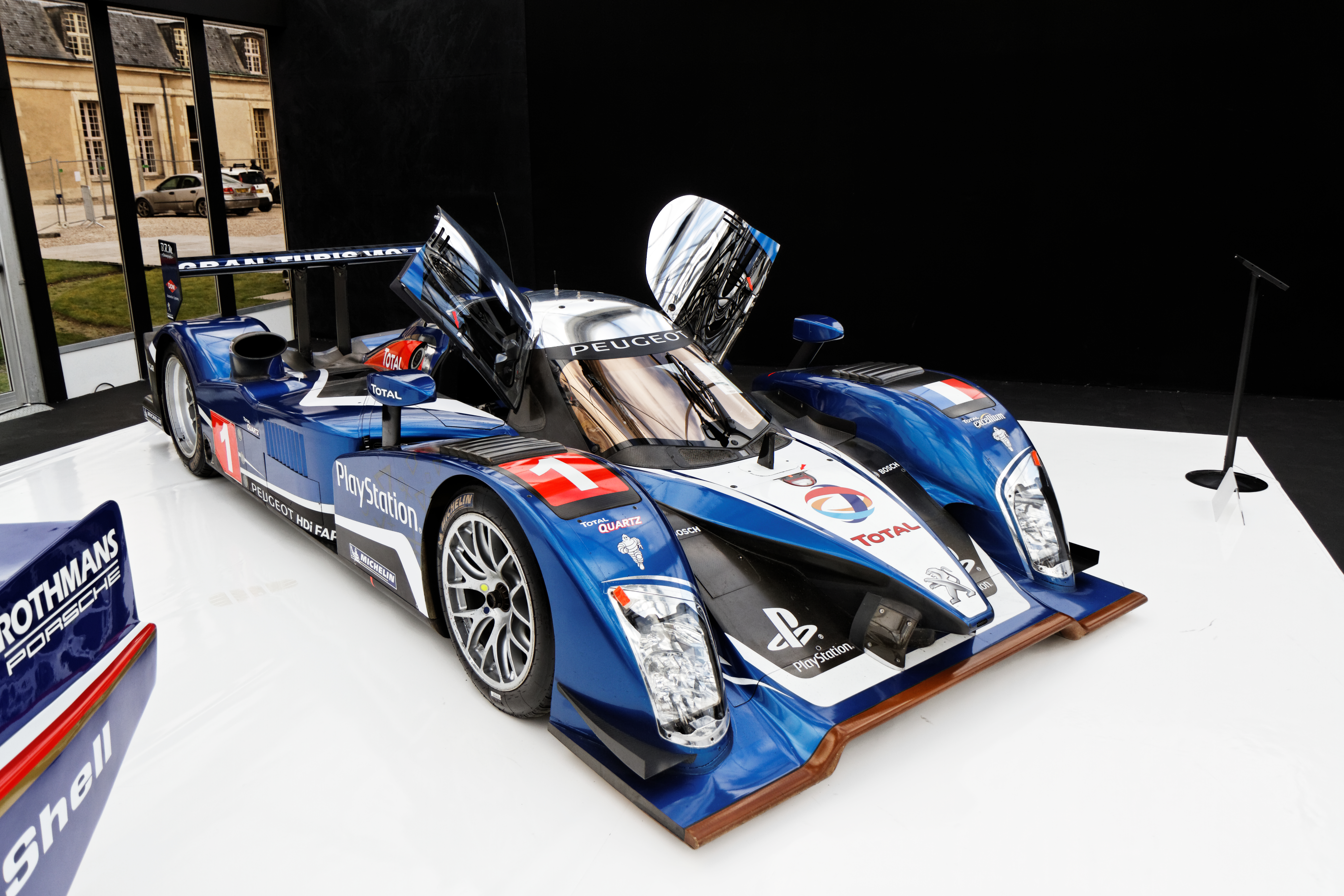 Une Peugeot 908 HDI FAP Le Mans prototype de 2008.